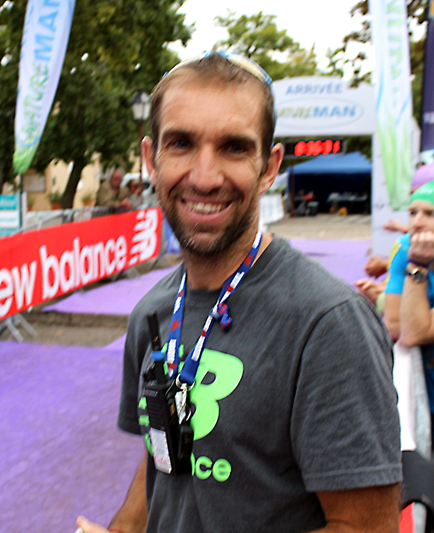 Nicolas Lebrun 2015